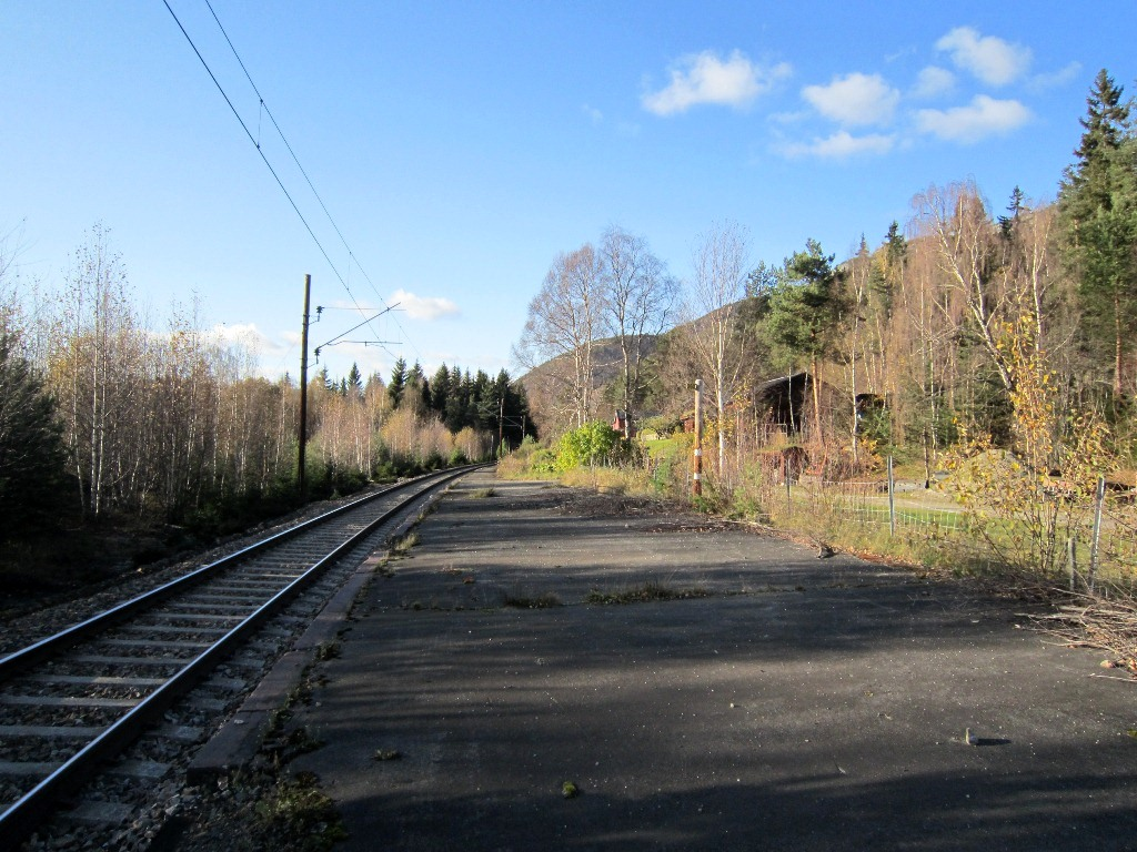 Stasjonsområdet på Harpefoss, der det en gang stod en stasjonsbygning.